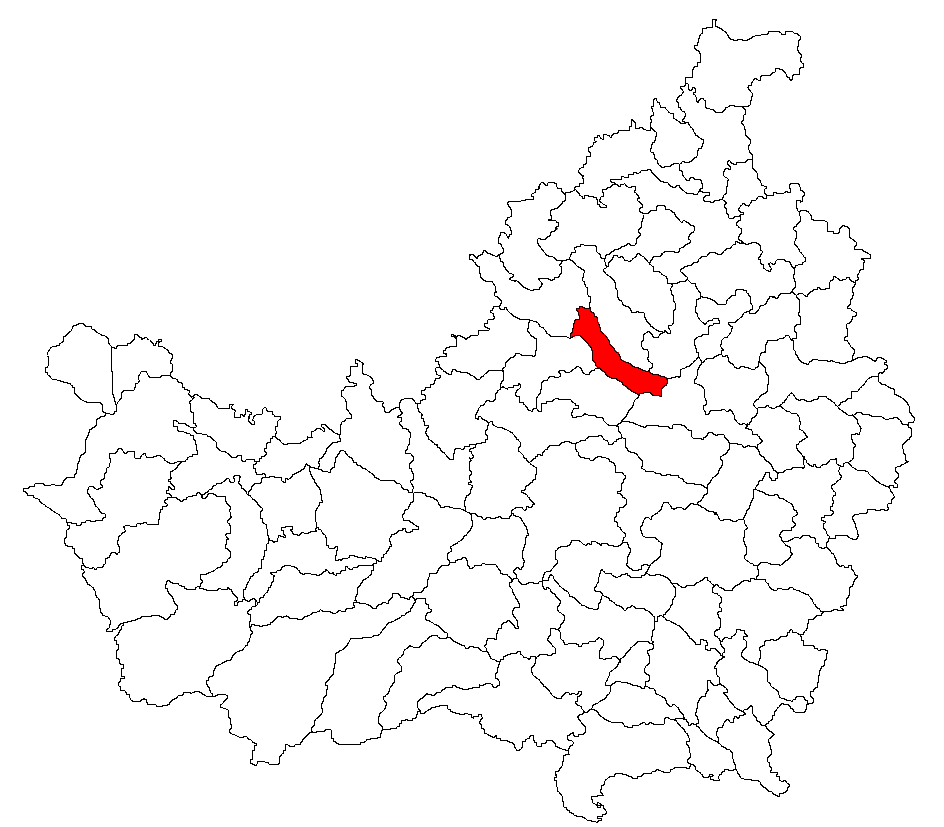 Categorie:Hărţi ale judeţului Cluj